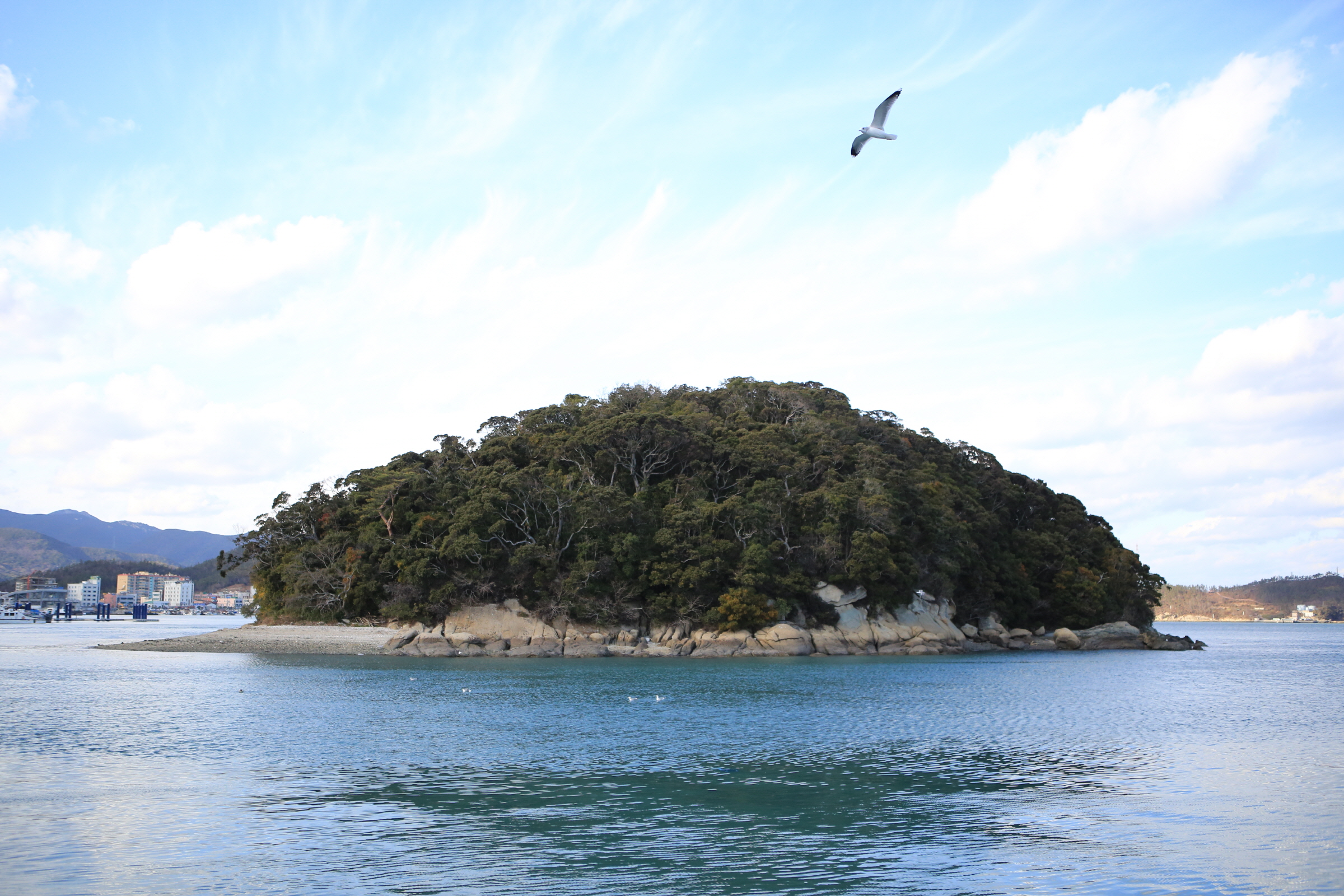 완도항 앞다바에 있는 섬 주도 천연기념물 제28호 상록수림